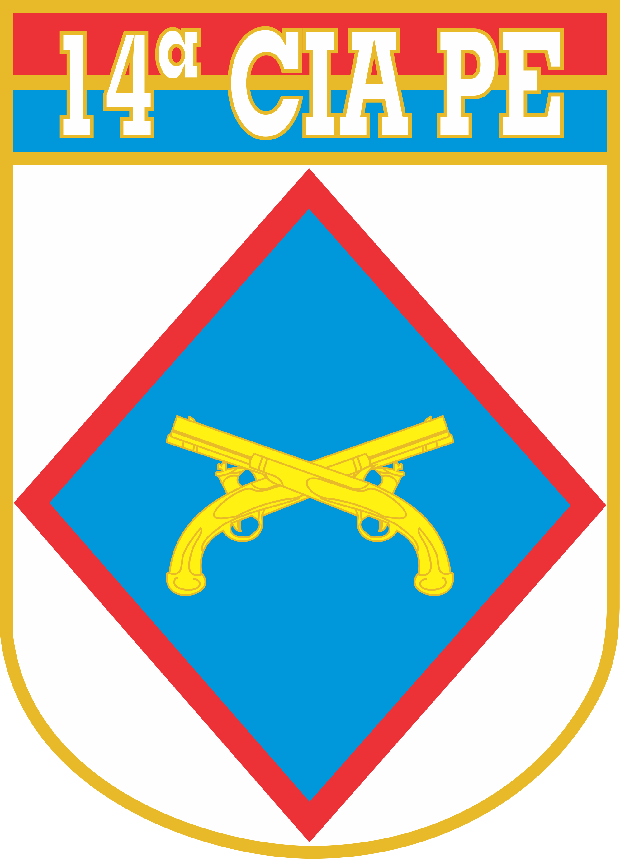 Distintivo 14ª Cia PE